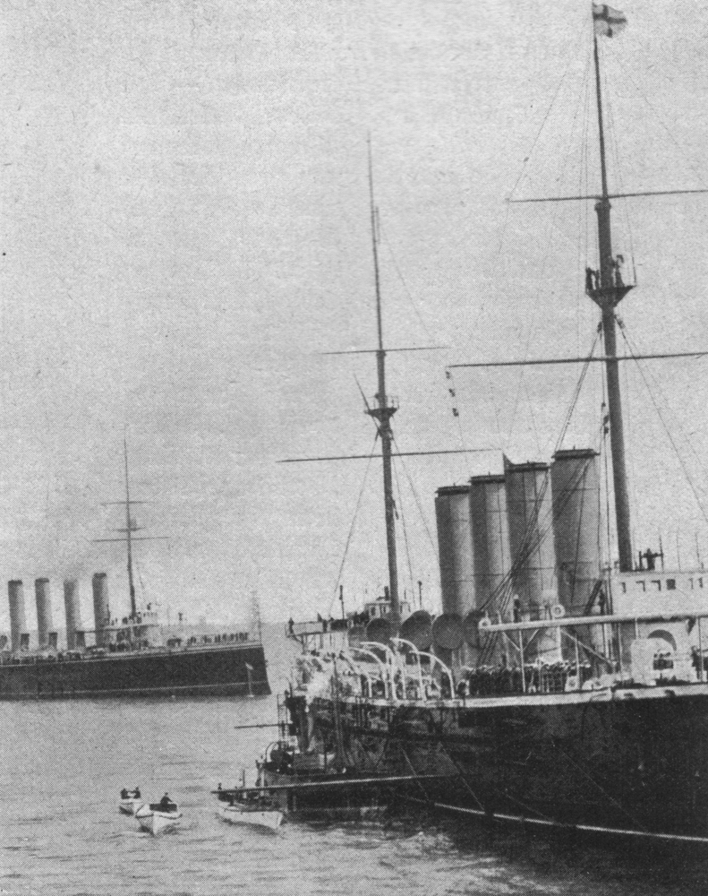 Die HMS Ariadne (Stapellauf 1898) vor Venezuela im Jahr 1902.